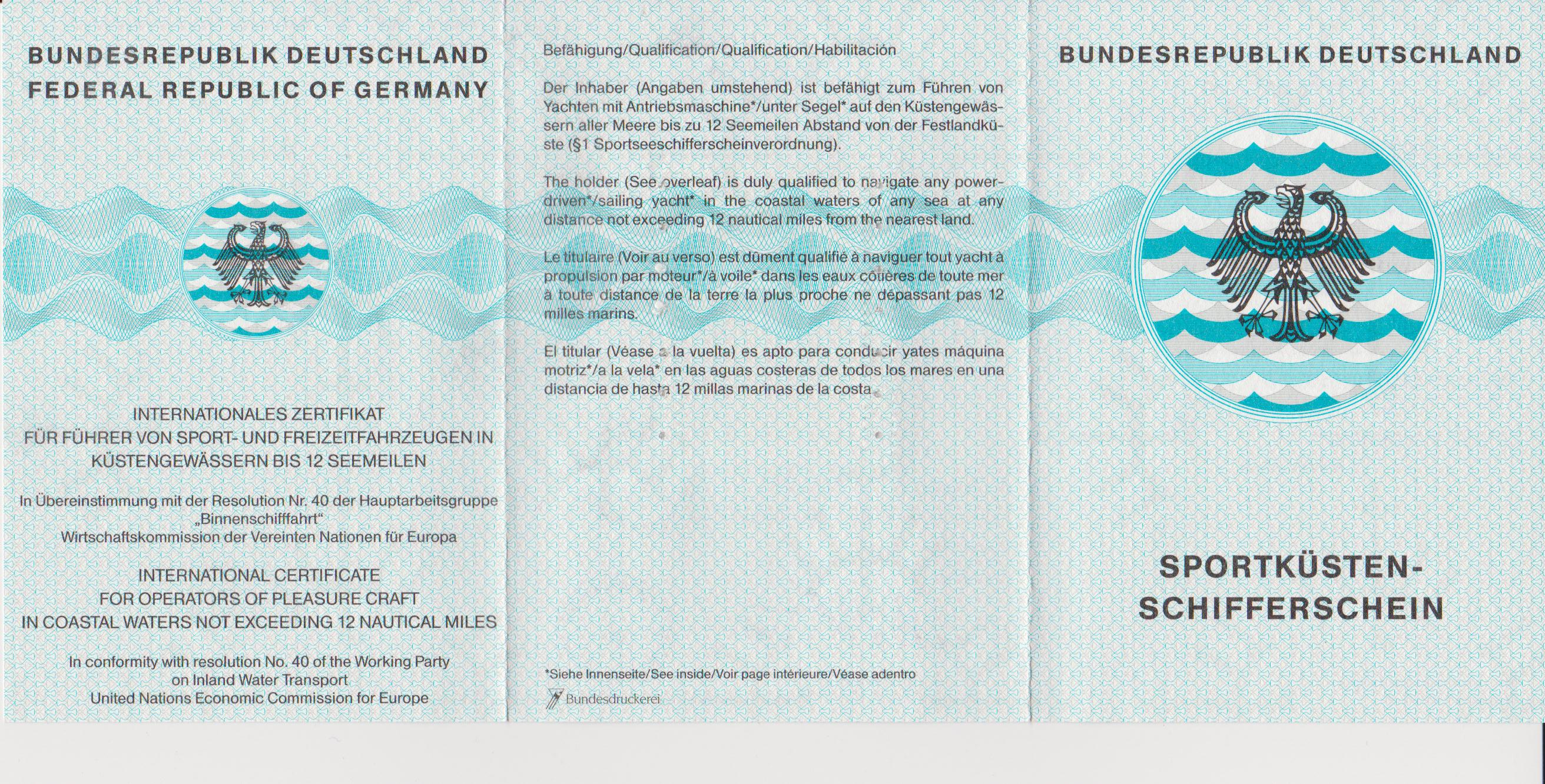 Sportküstenschifferschein